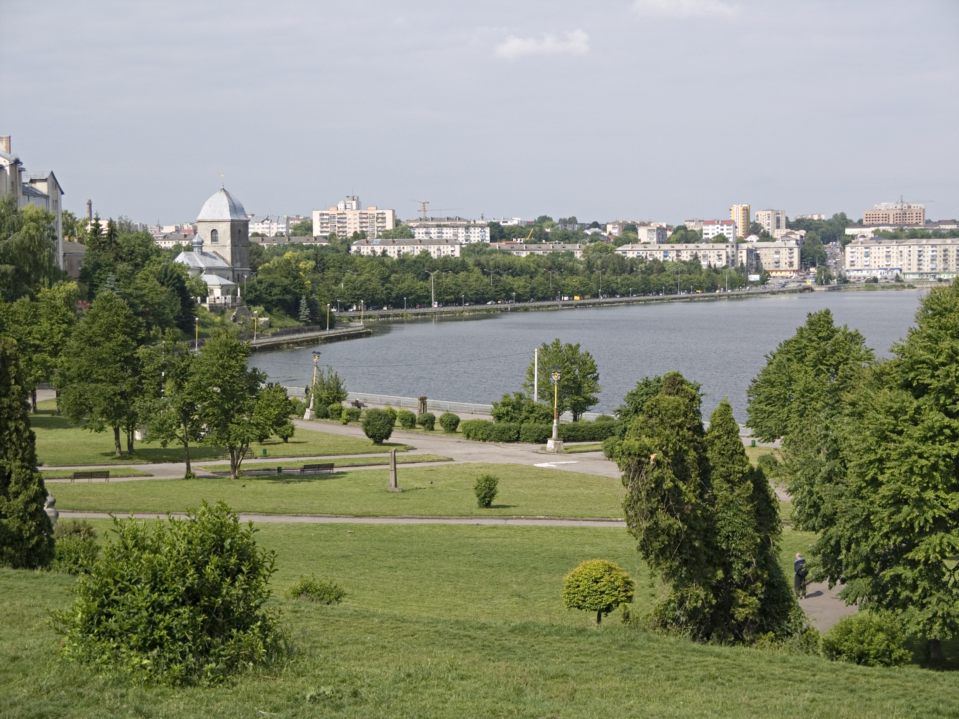 Україна. Тернопіль - Здвиженська (Надставна) церква